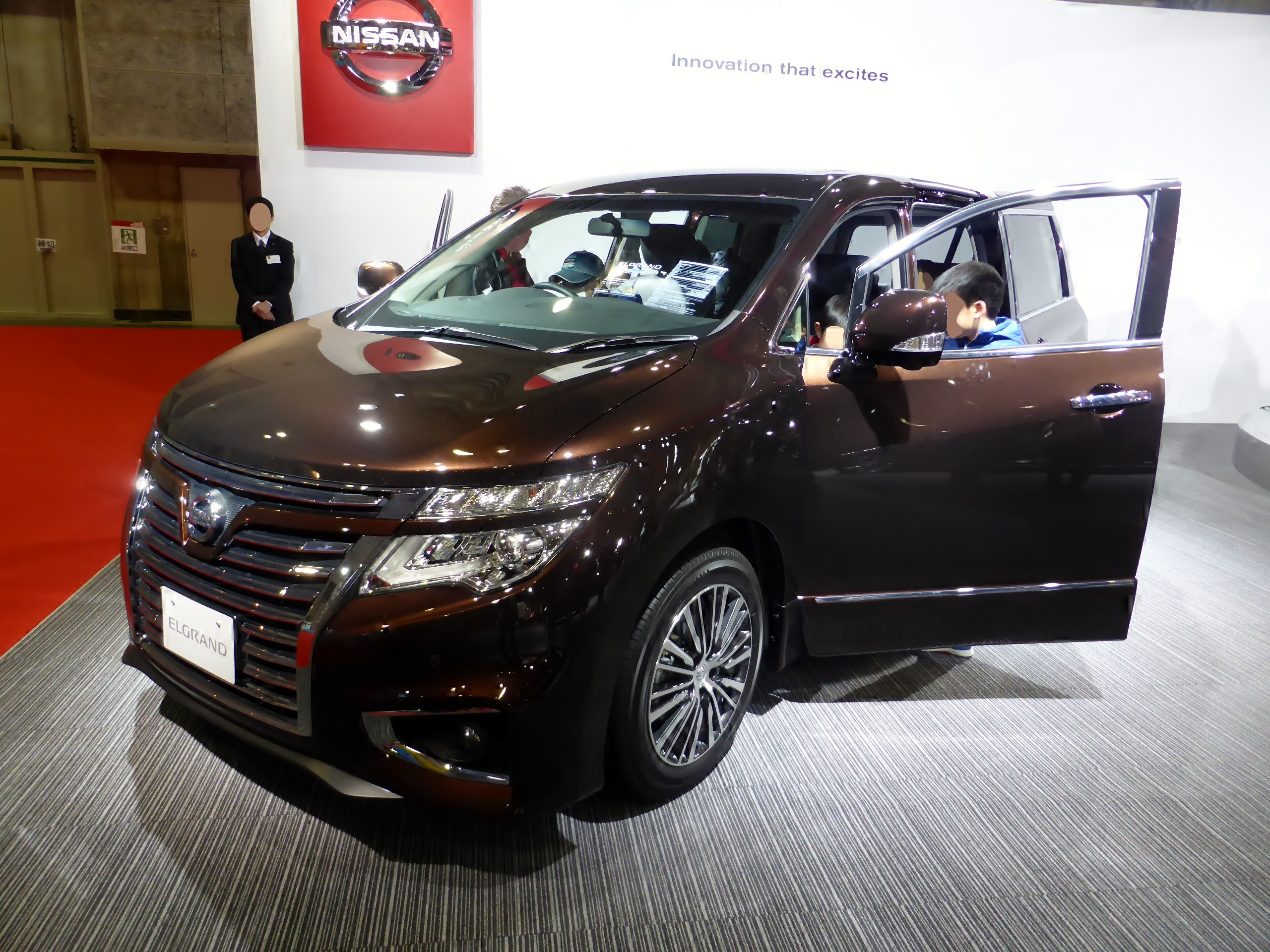 大阪モーターショー2013の日産ブースにおいて2014年1月のマイナーチェンジ後のE52型エルグランドハイウェイスターを撮影。